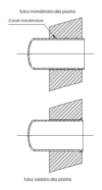 Tipi di accoppiamento tubo-piastra